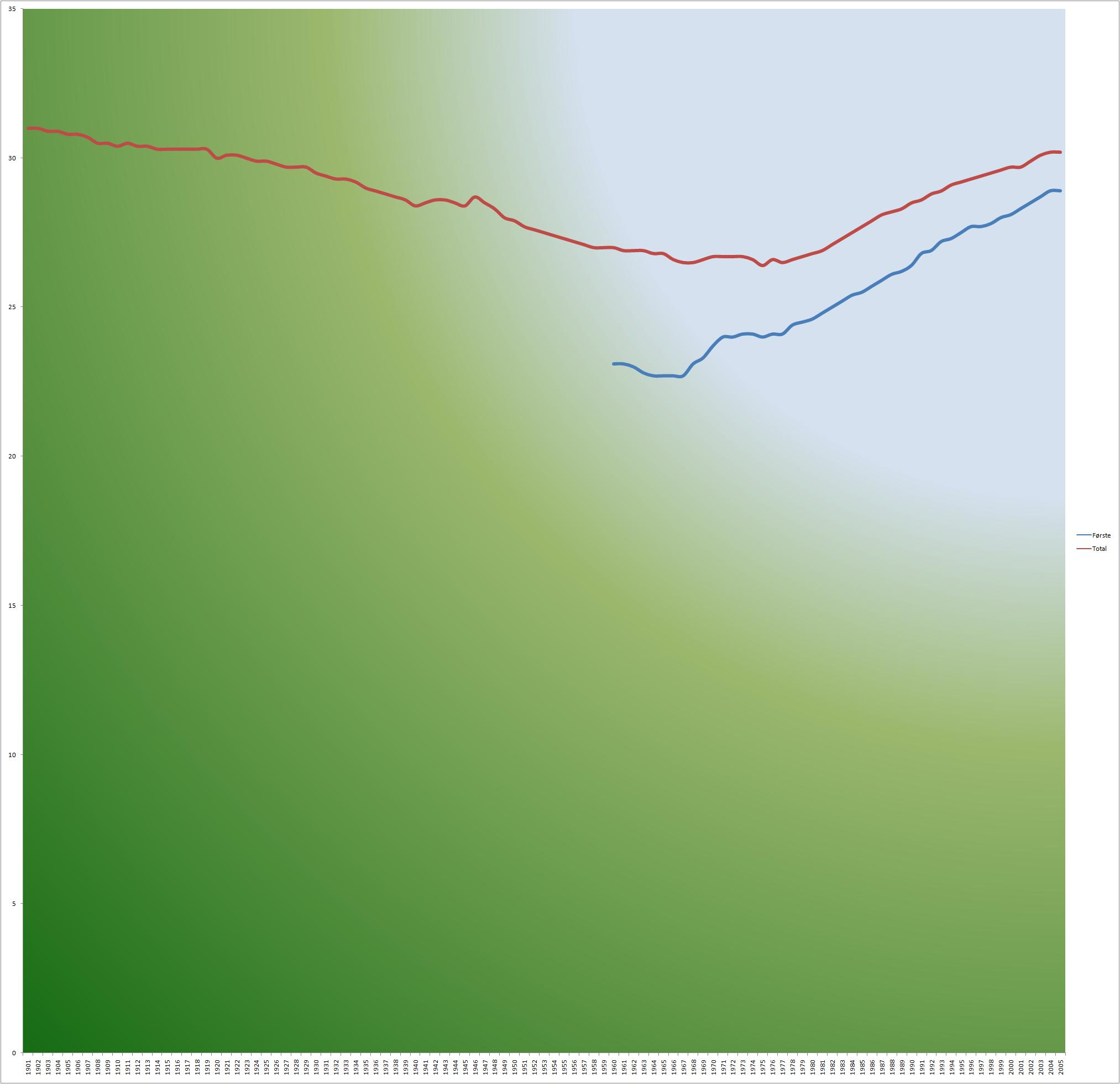 Gennemsnitsalder ved fødsel. Rød=total, blå=ved første barn. Baseret på data fra Dansk Statistik.